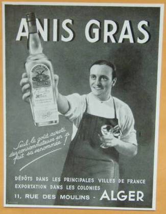 Affiche de publicité pour l'anisette Gras, 1939, Alger